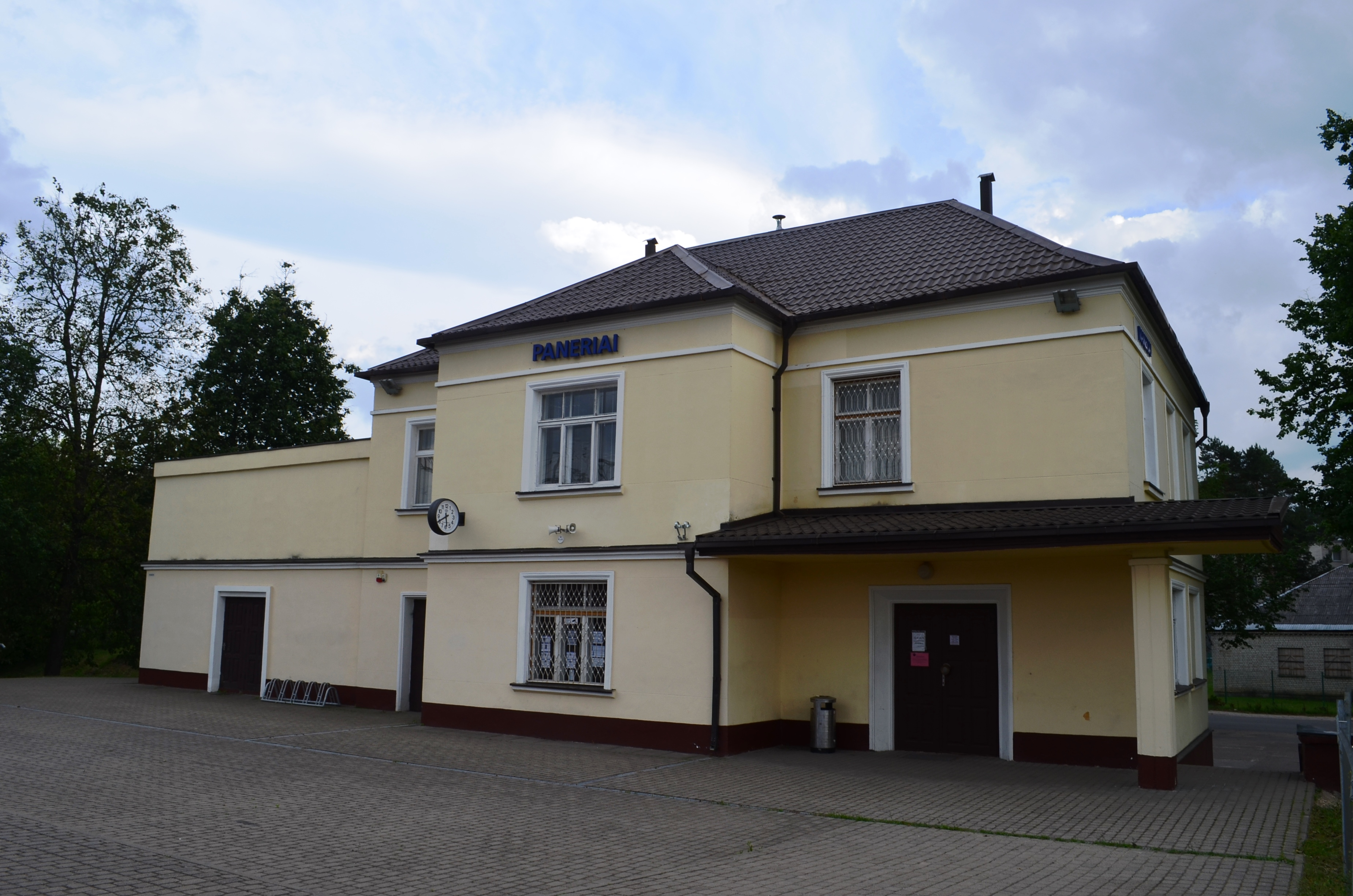 Panerių geležinkelio stotis, Aukštieji Paneriai, Vilnius